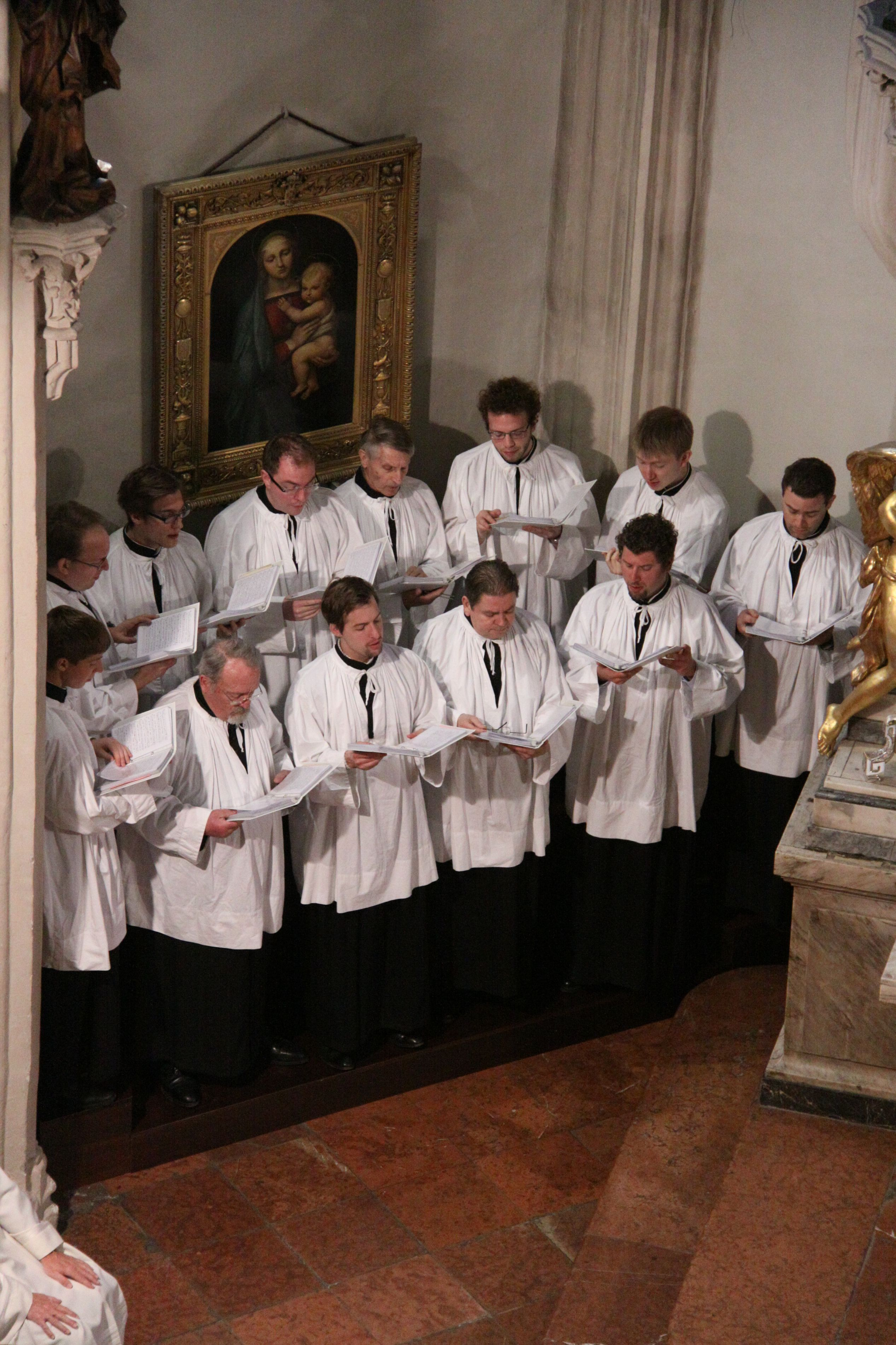 Die Herren der Choralschola bei ihrem sonntäglichen Choraldienst in der Hofburgkapelle